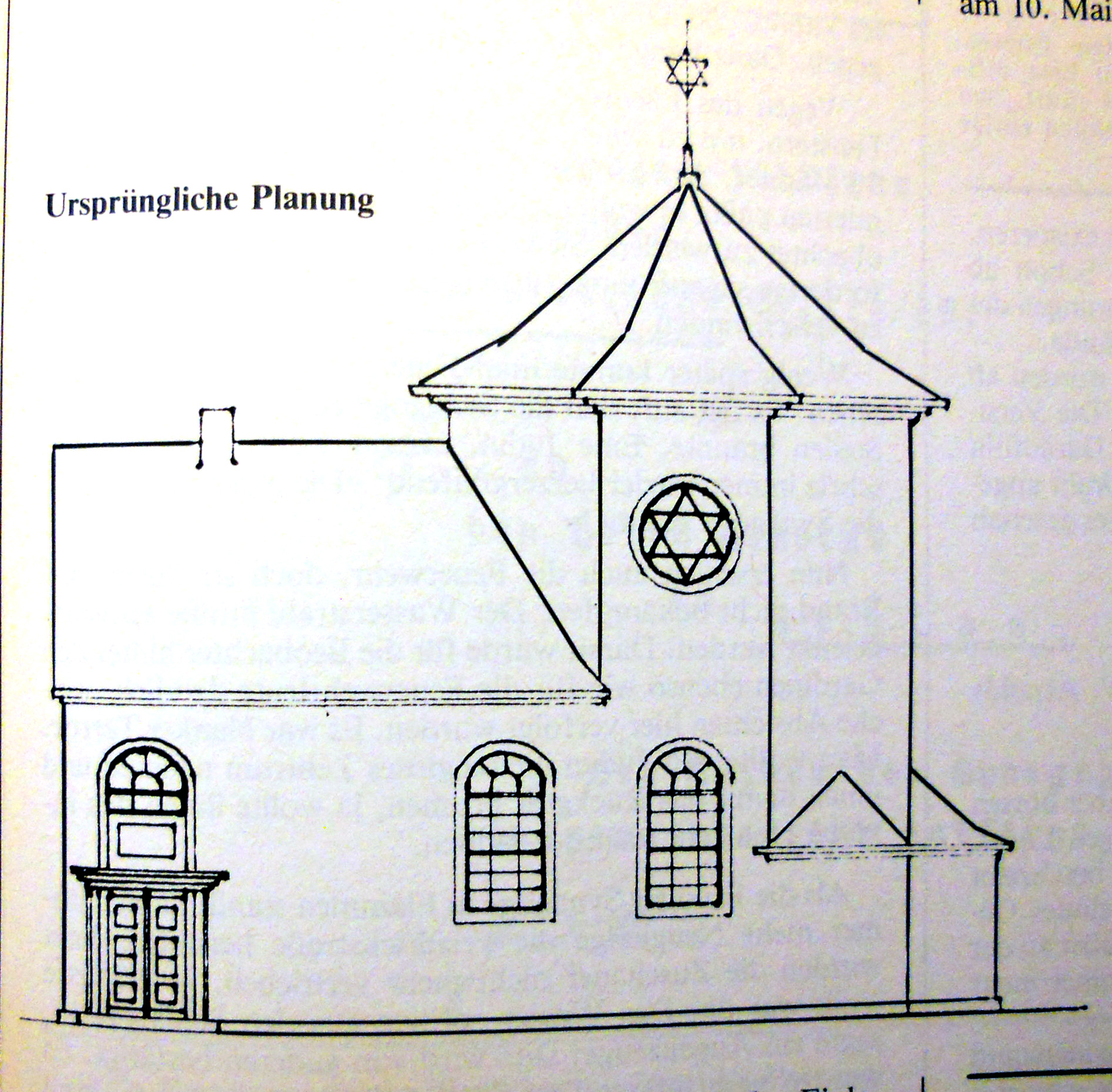 Synagoge in Brilon, ursprüngliche Planung